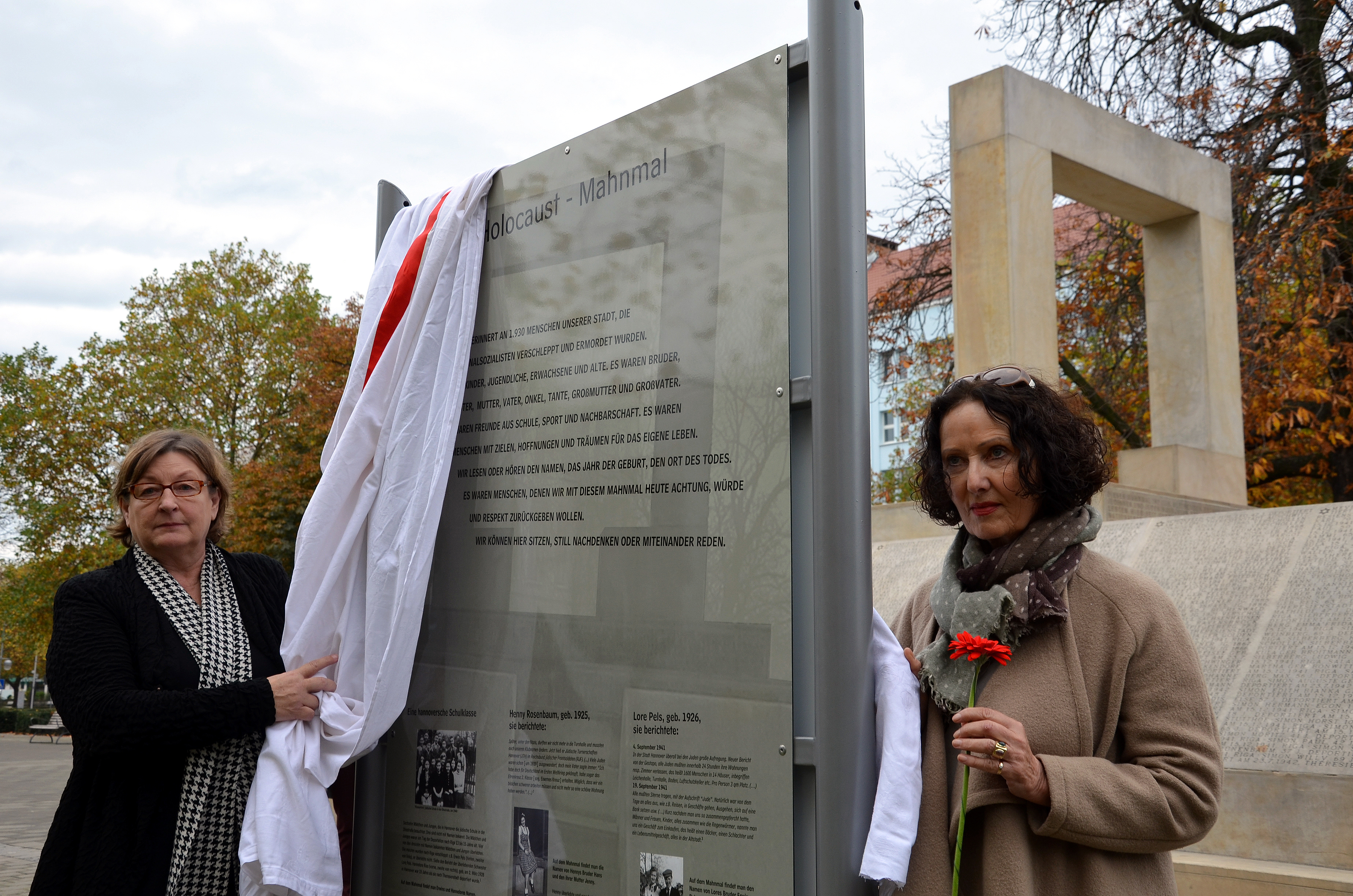 Am 25. Oktober 2013 ab 13.00 Uhr enthüllten Ingrid Wettberg, die Vorsitzende der Liberalen Jüdischen Gemeinde Hannover, gemeinsam mit Hannovers Kultur- und Schuldezernentin Marlis Drevermann, die Informationstafel zum Mahnmal für die ermordeten Juden Hannovers. Begleitet von den Klängen des Musikers Thomas Zander und vorgetragener Inhalte der Tafel durch Schüler der St. Ursula-Schule Hannover nahmen zahlreiche Gäste aus Politik, Kultur und Gesellschaft an der Veranstaltung teil, darunter die Holocaust-Überlebenden Salomon Finkelstein und Henry Korman ...